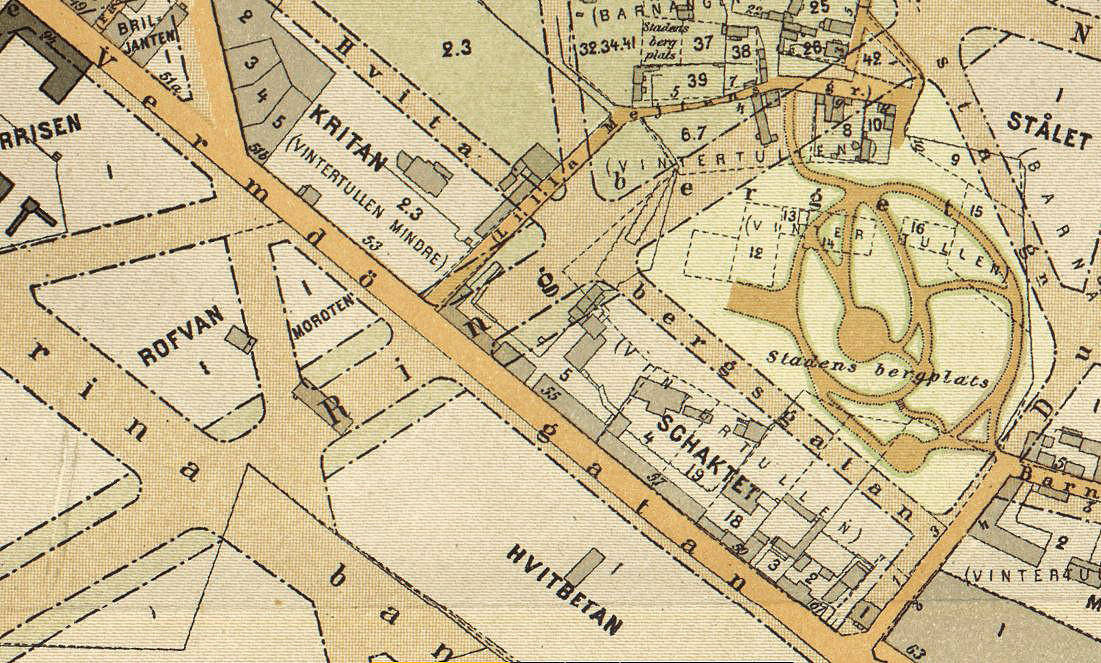 Kvarteren Vintertullen och Vintertullen mindre (nuvarande Malmgårdsvägen)